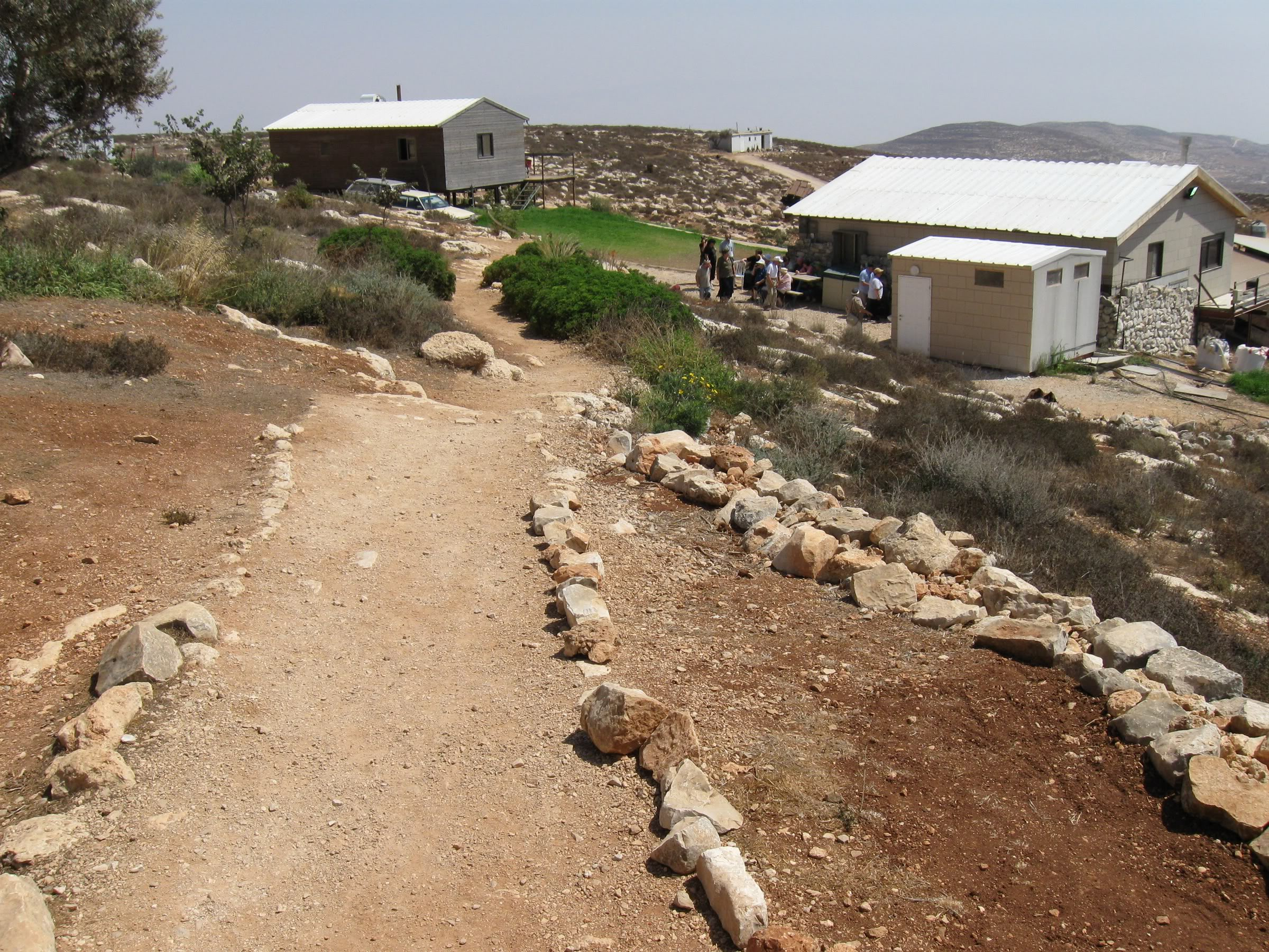 חוות סאקלי ליד אלון מורה